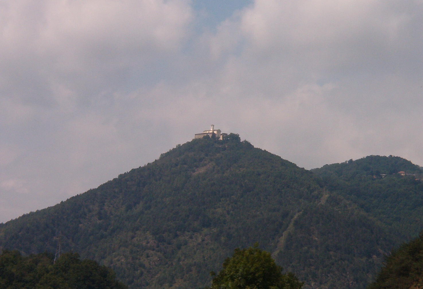 Santuario Sant'Ignazio - Pessinetto - Provincia di Torino - Piedmont - Italy